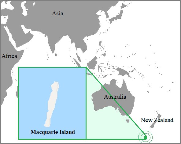 Rozšíření tučňáka královského v období hnízdění. Zdroj mapy